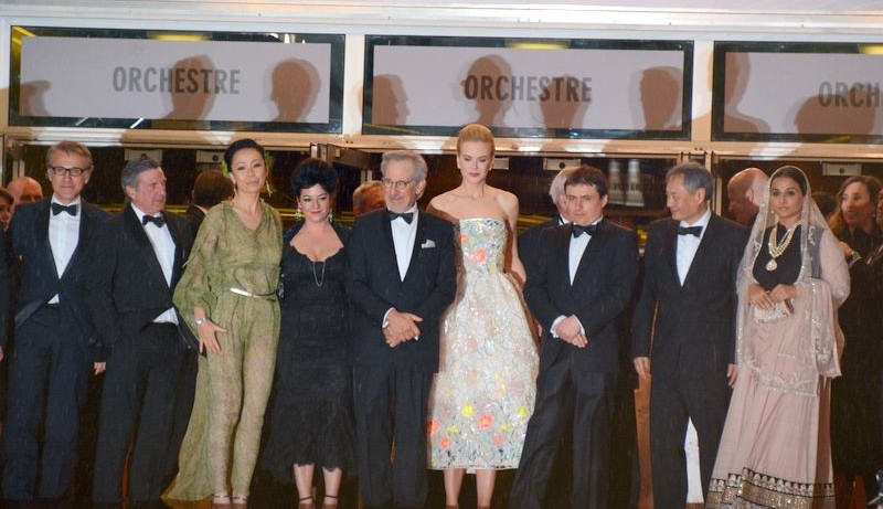 Le jury de la sélection long-métrages du festival de Cannes. De gauche à droite, Christoph Waltz, Daniel Auteuil, Naomi Kawase, Lynne Ramsay, Steven Spielberg, Nicole Kidman, Cristian Mungiu, Ang Lee, Vidya Balan